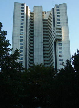 Fritz-Erler-Allee 120 ("Ideal-Wohnhaus"), das höchste Wohnhaus Berlins.